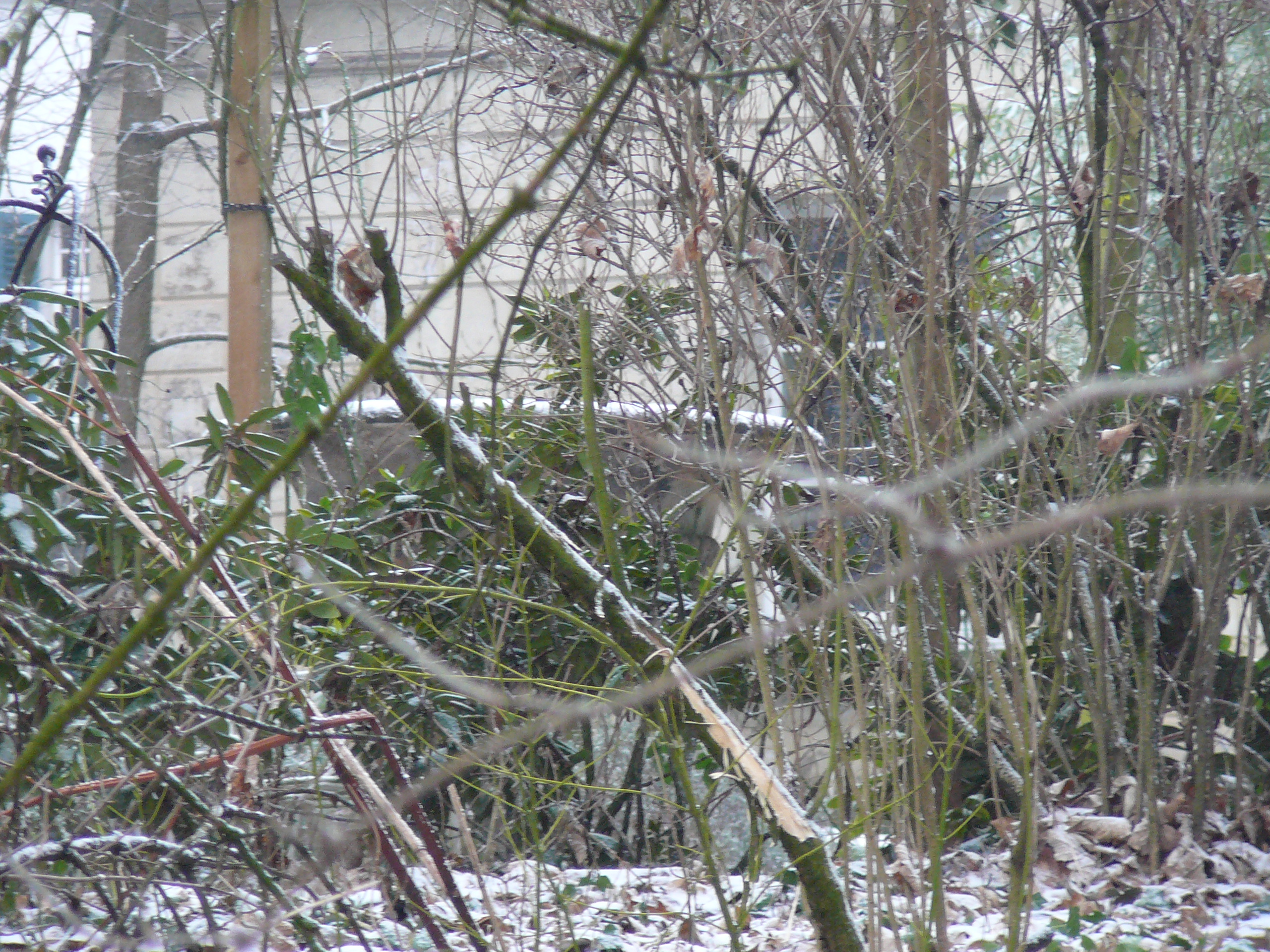 Villa Dahl, Schloßstraße, Wuppertal